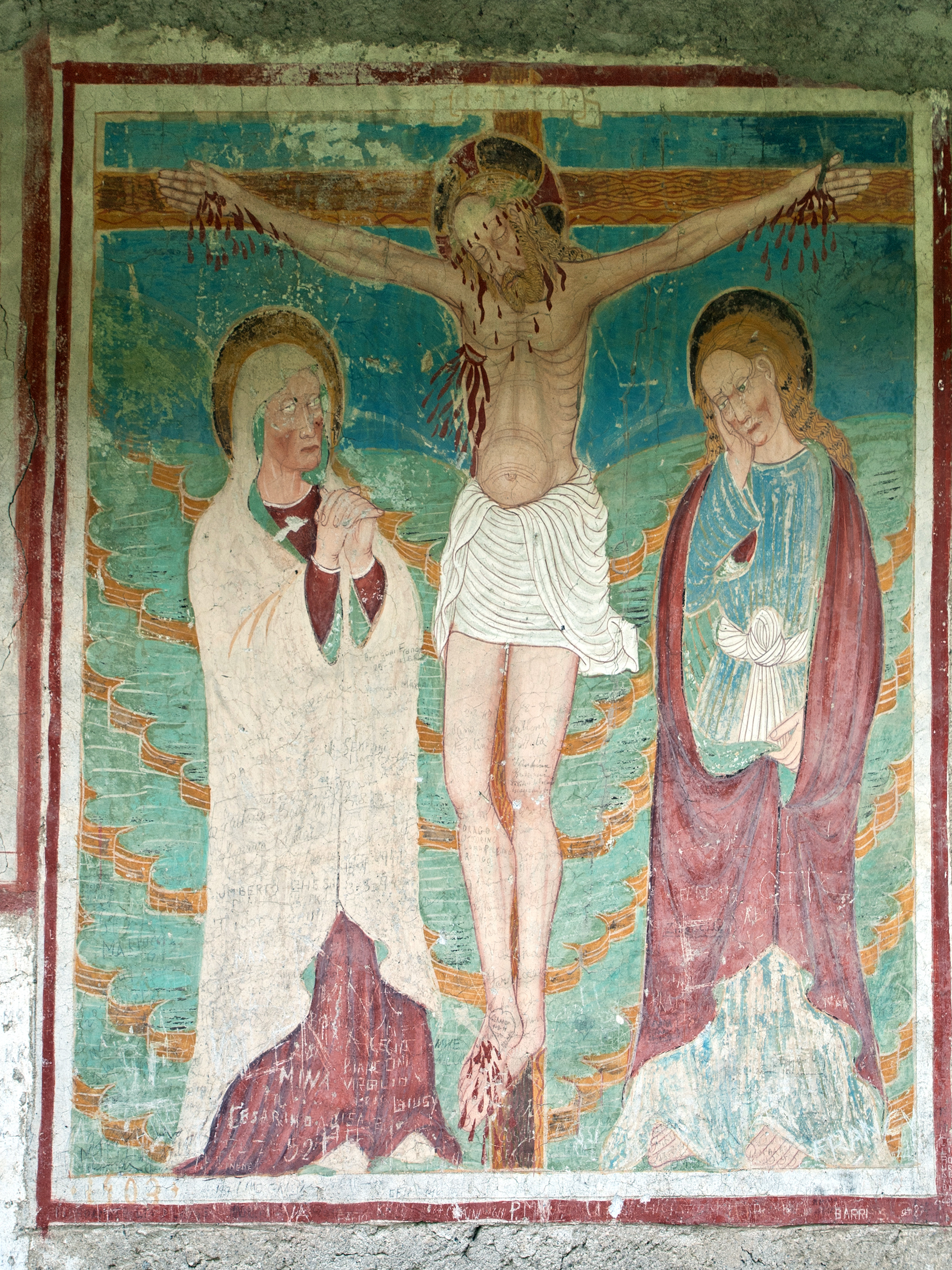 Chiesa di Sant'Agnese (XIII sec.) - Sondalo, Valtellina Italy. Fresco (1403?)